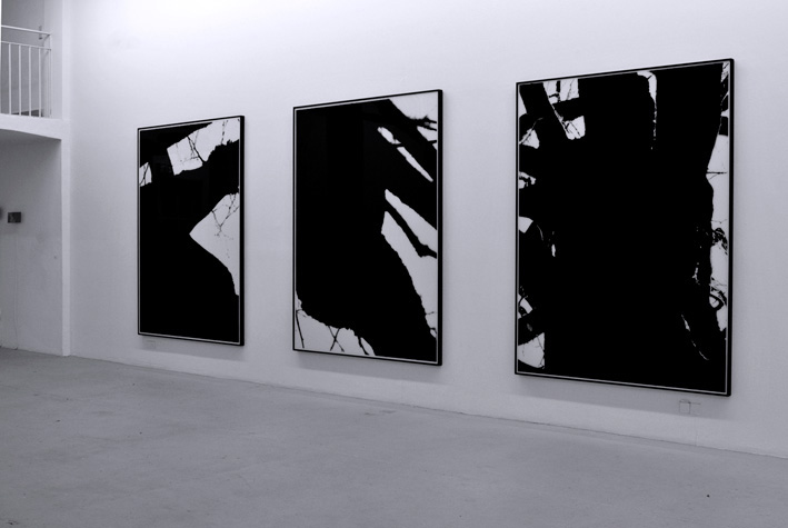 Japantusche auf Fotografie, Plexiglas, Aludibont gerahmt, je 210 cm x 157 cm